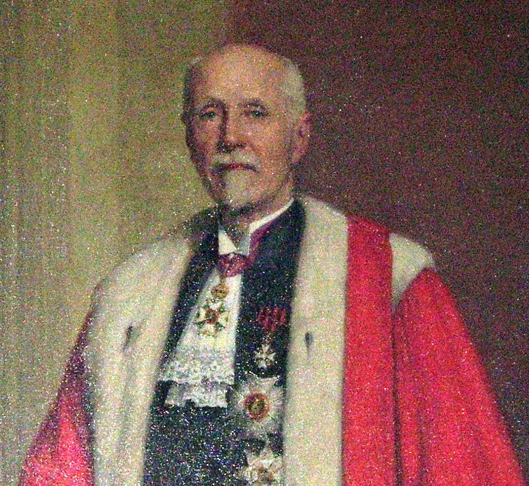 Portrait du Baron Meyers